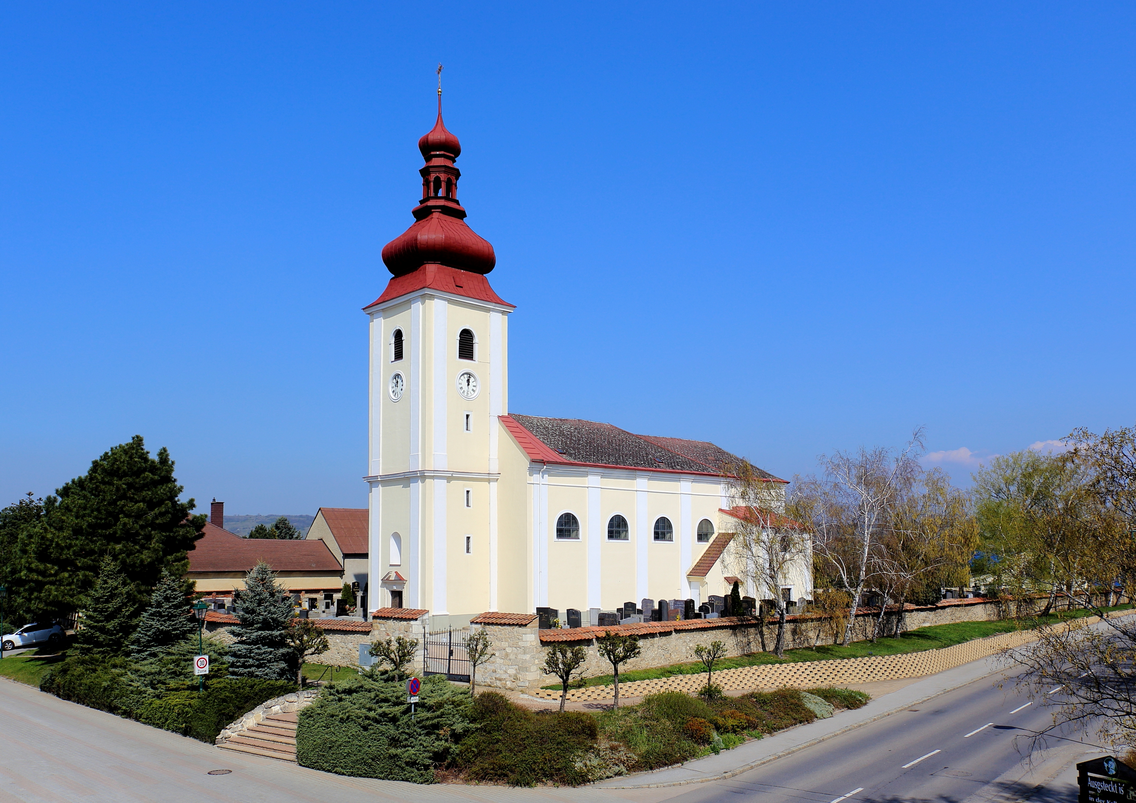 Südansicht der Pfarrkirche Hl. Geist in der niederösterreichischen Marktgemeinde Prellenkirchen. Bei den Türkenkriegen (1683) wurde die Kirche schwer beschädigt, anschließend weitgehend neu in barockem Stil errichtet und 1744 geweiht. Die Kirche mit dem hohen vorgstellten Westturm befindet sich in erhöhter Lage am östlichen Ortsrand und ist von einem Friedhof sowie einer Bruchsteinmauer umgeben.